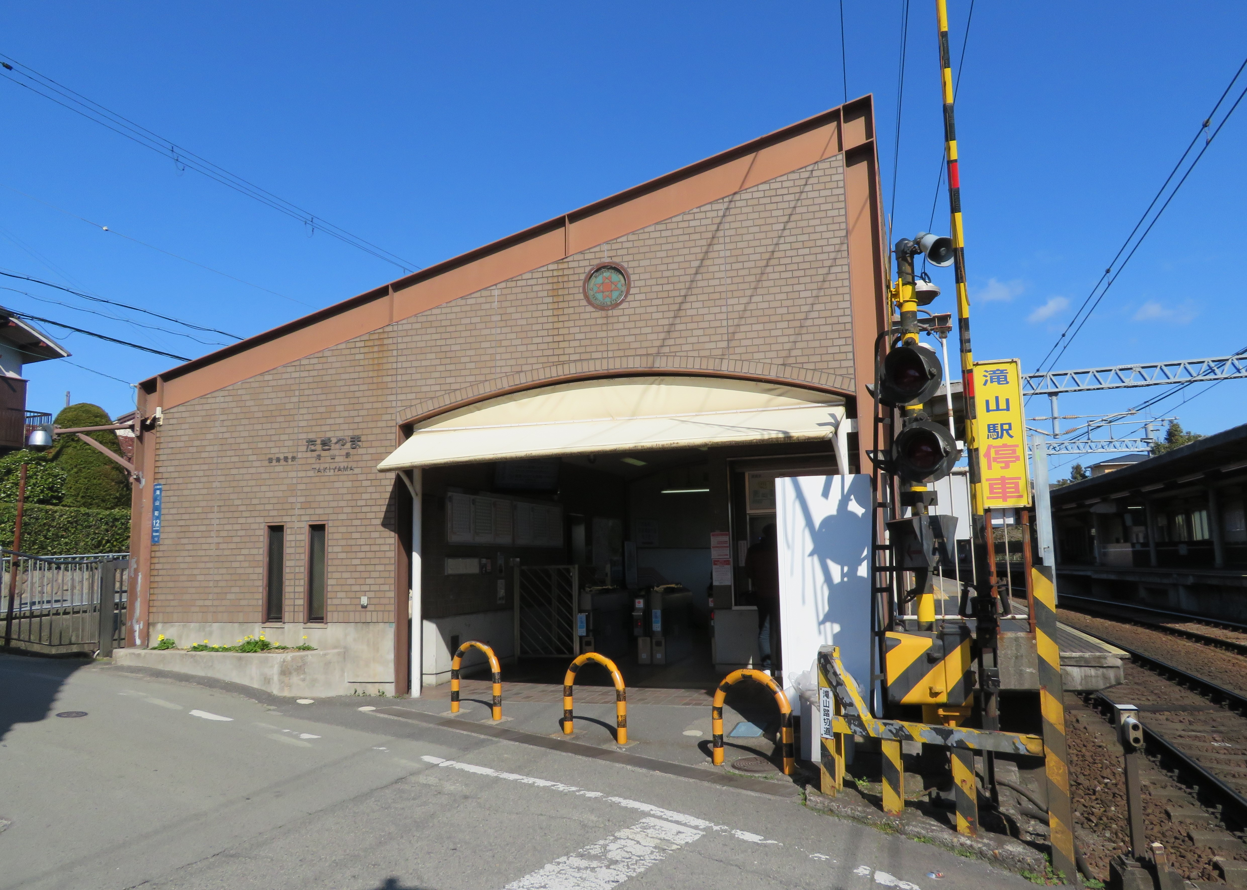 能勢電鉄滝山駅